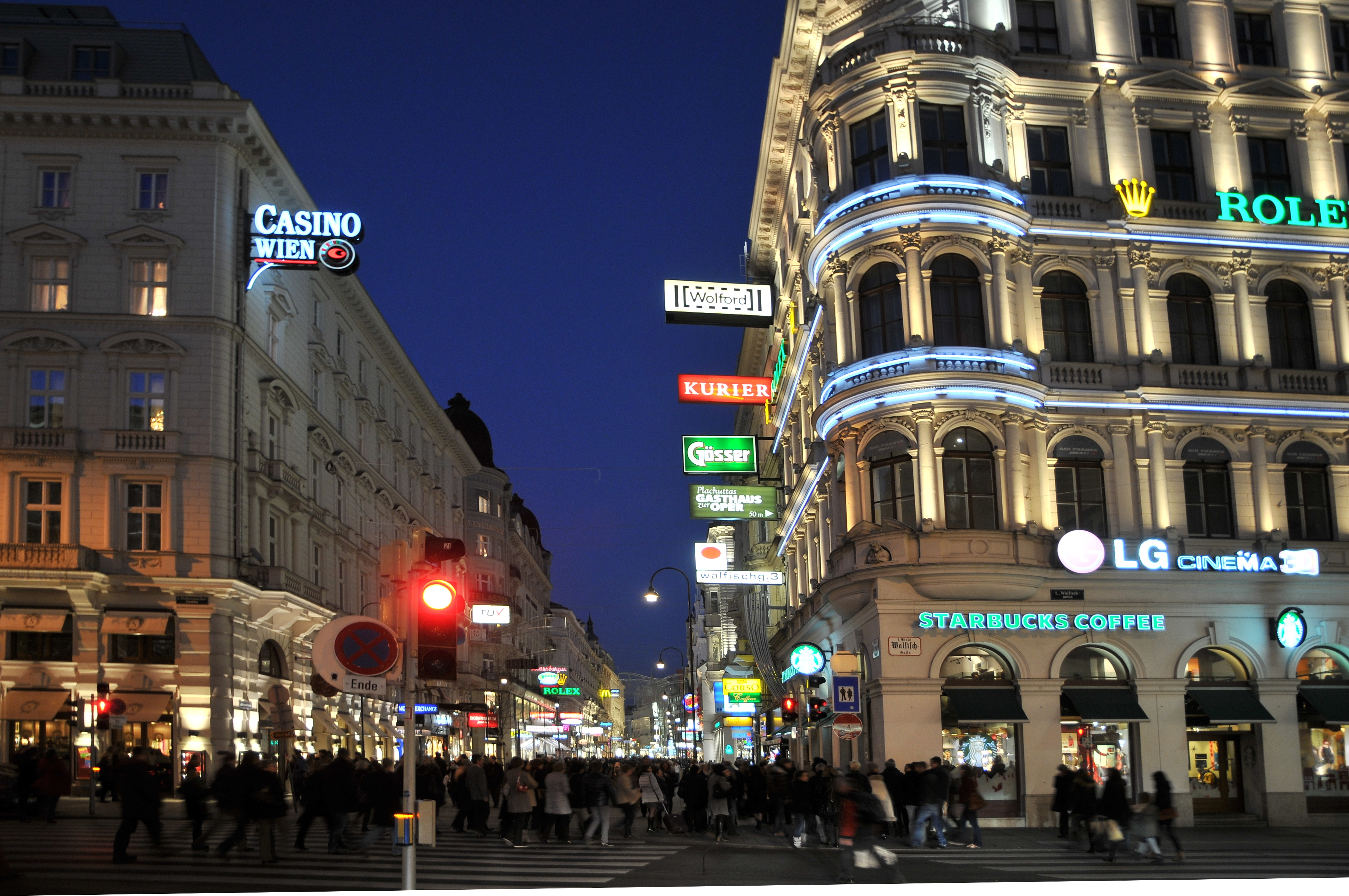 Kärntner Straße, Ecke Walfischgasse. Die Rolex SA ist eine Schweizer Uhrenmanufaktur mit Hauptsitz in Genf und einer grossen Uhrenmanufaktur in Biel/Bienne, die hochwertige Uhren im oberen Preissegment herstellt und aufgrund einer starken Markenposition derzeit eine der meistkopierten Uhrenmarken weltweit ist.